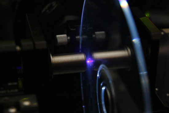 Disku holografik